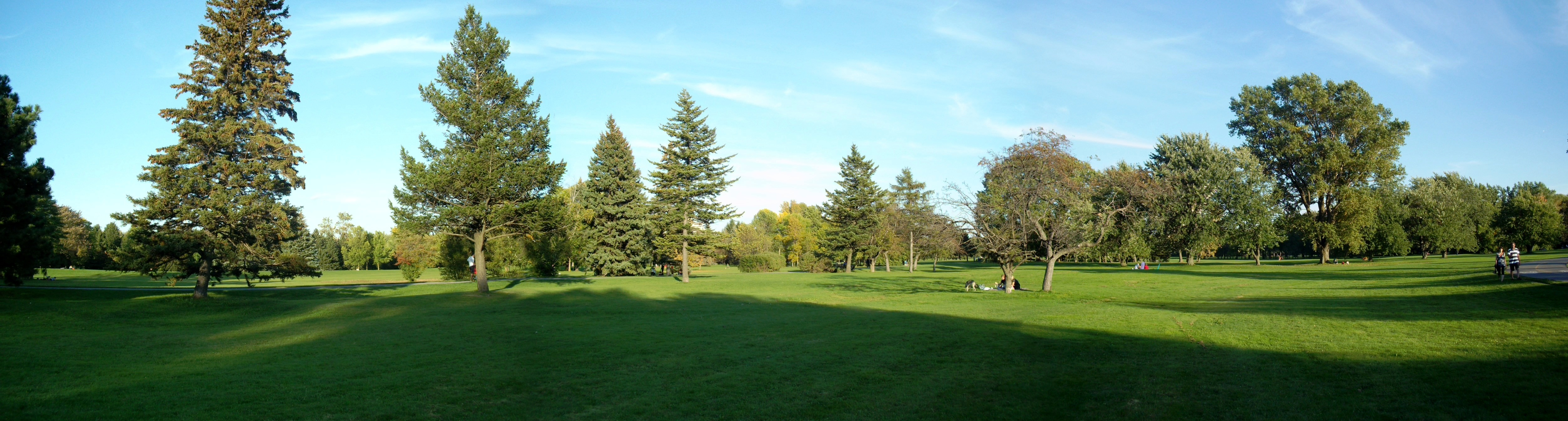 Parc Maisonneuve, Montréal, Québec